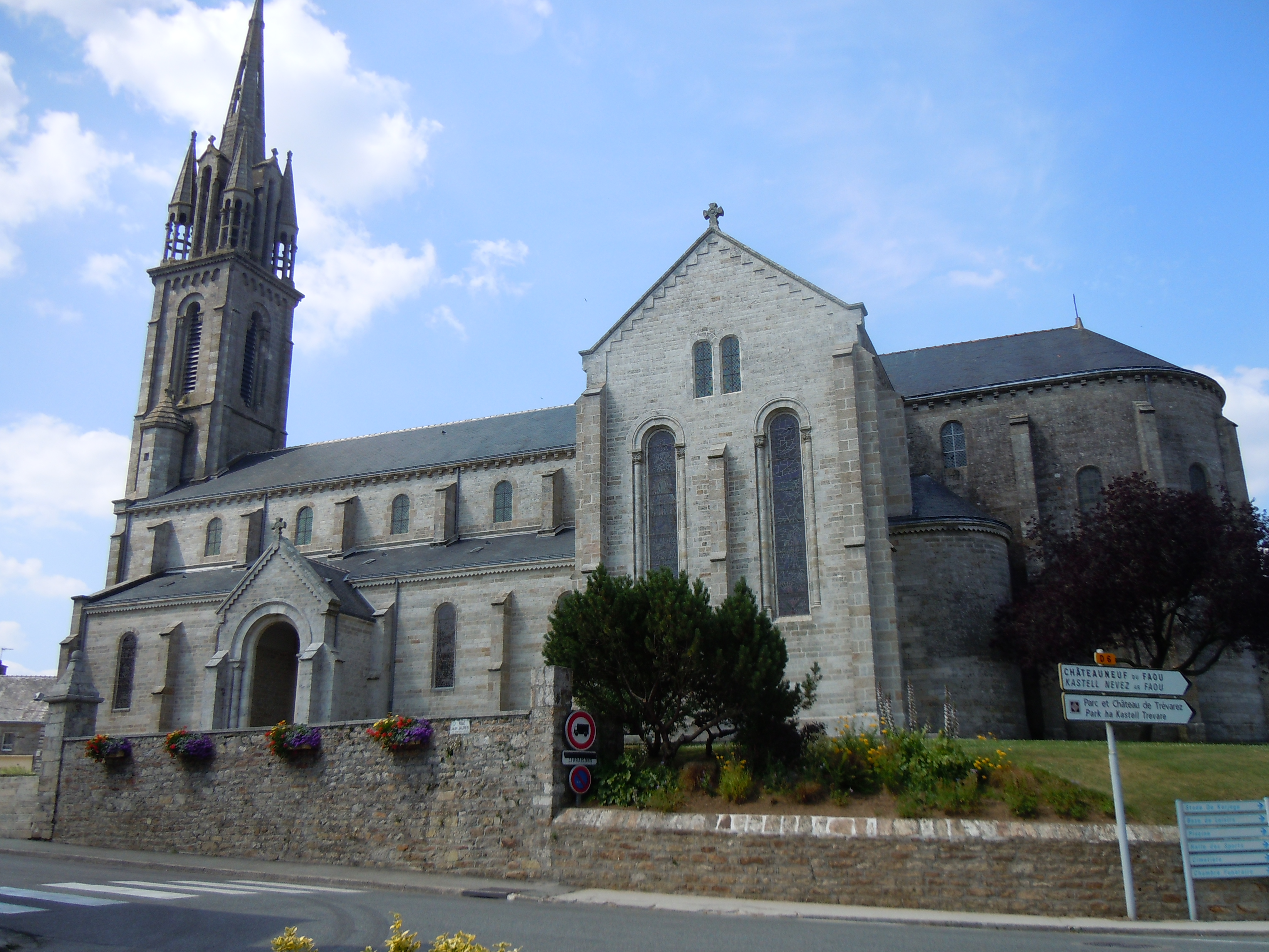 façade méridionale de l'église paroissiale de Scaër (Finistère)